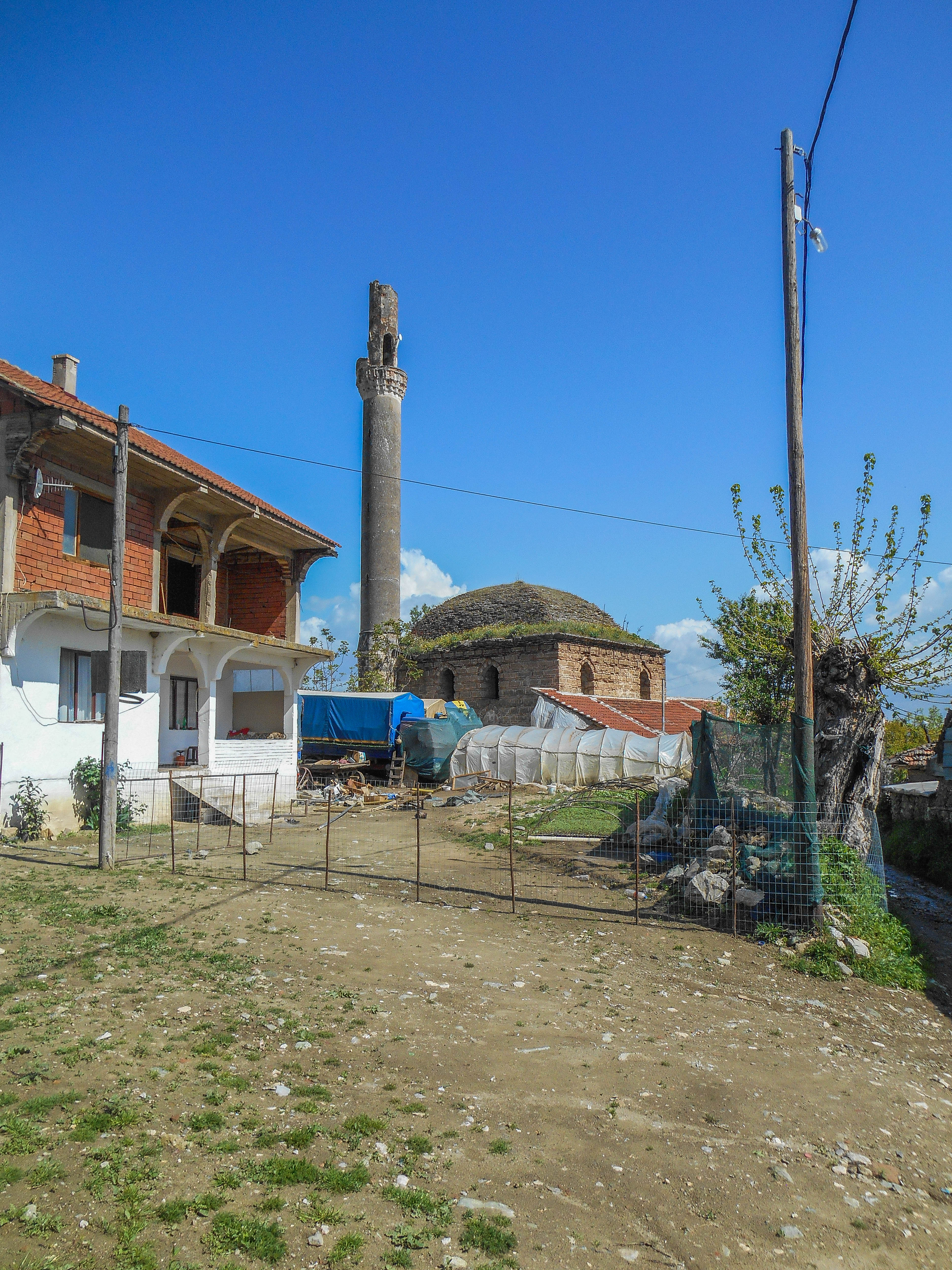 Старата џамија во Баница